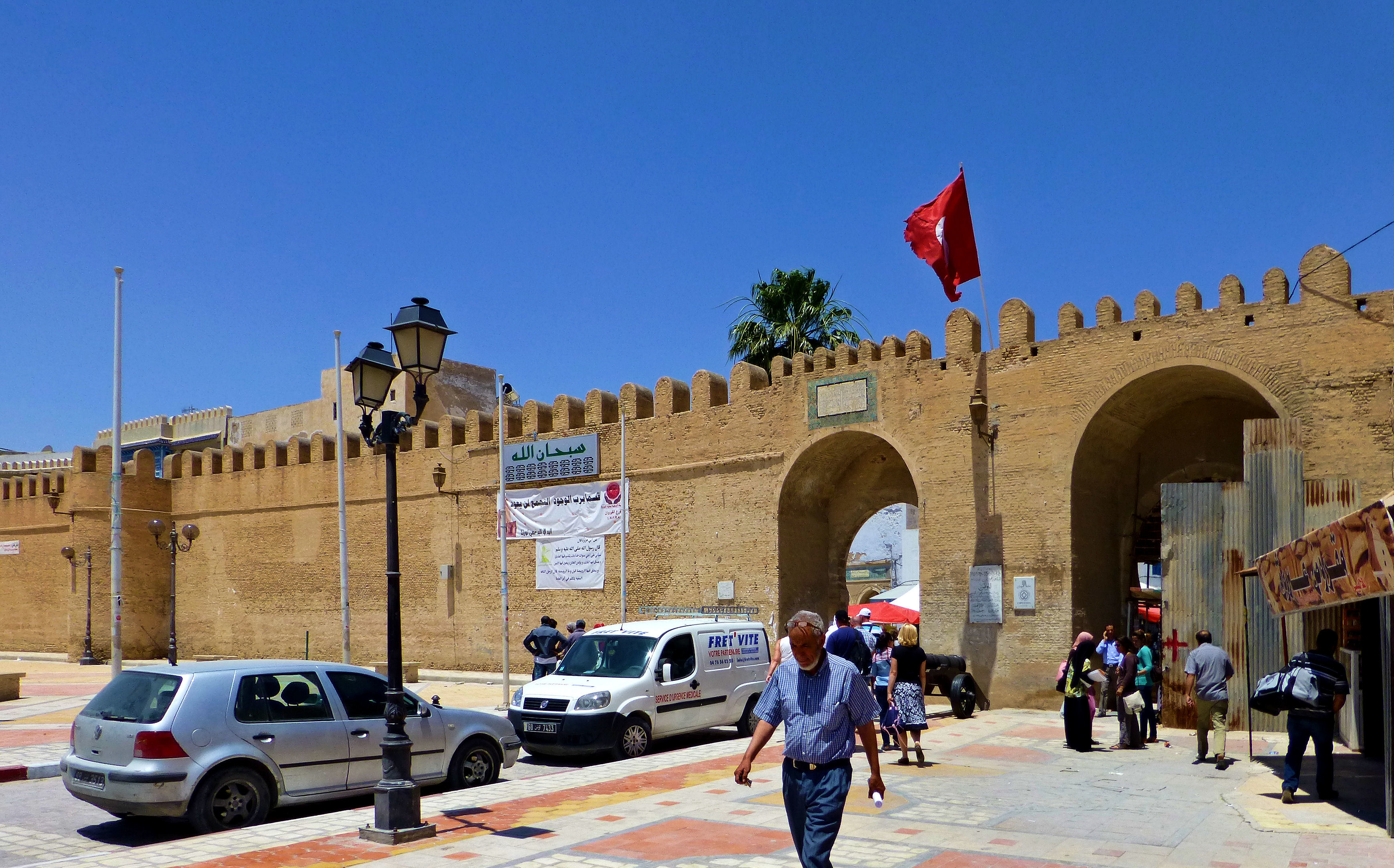 Tunezja, Kairouan, Place des Martyres